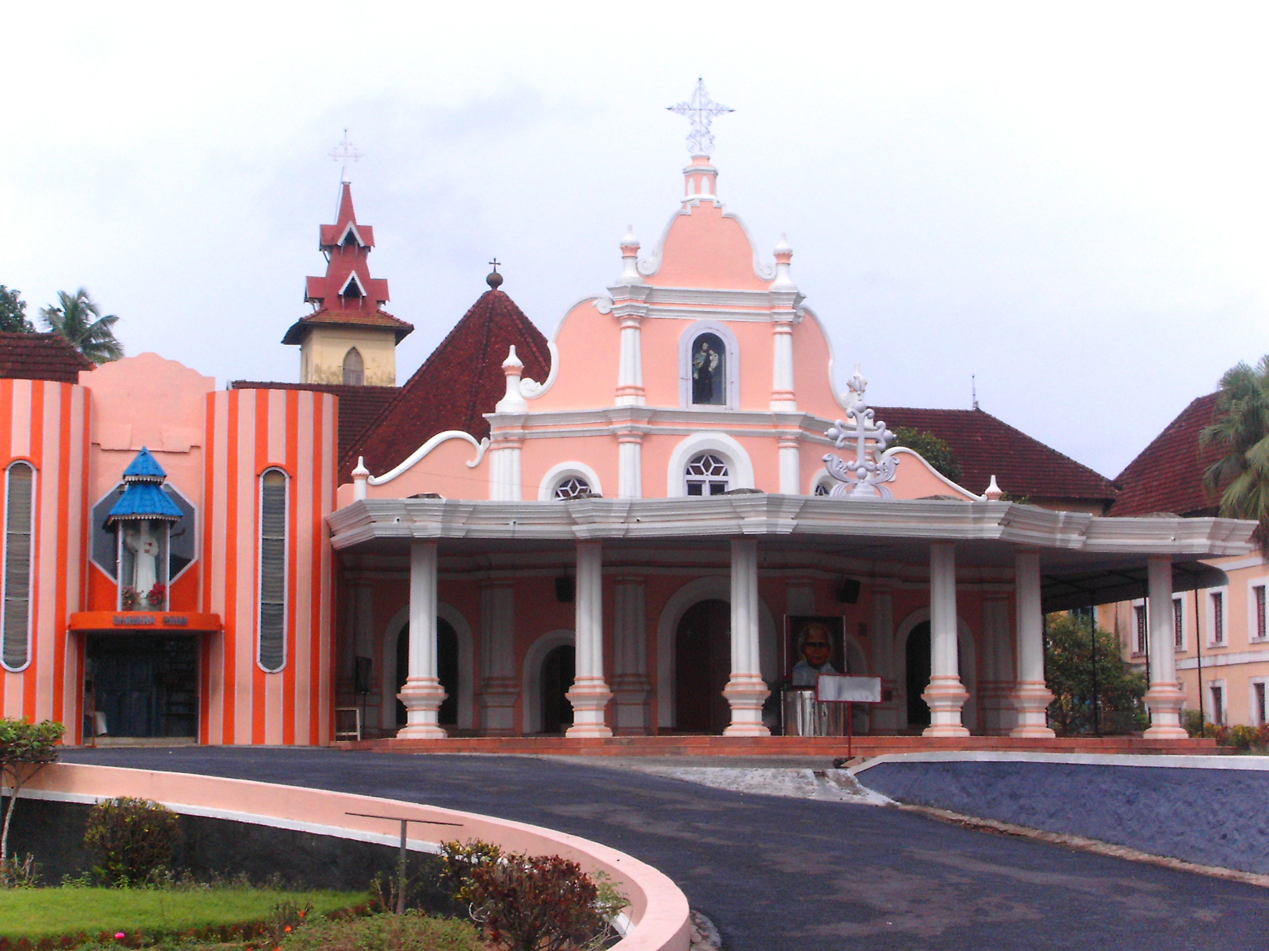 Klosterkirche Mannanam, Kerala, Indien